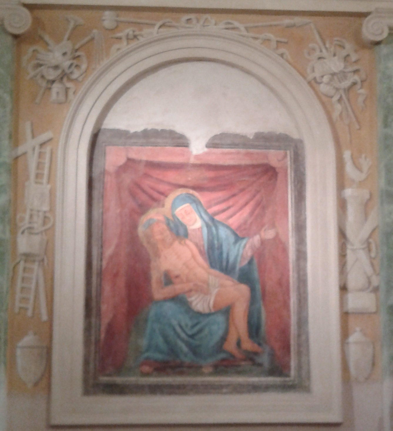 Pietà